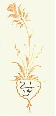 Signature of Levni. Topkapı Sarayı Müzesi, Istanbul